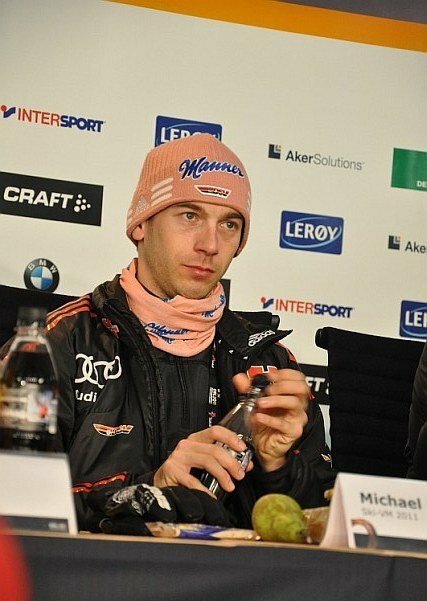 Michael Neumayer na konferencji prasowej po konkursie drużynowym mężczyzn na skoczni normalnej podczas Mistrzostw Świata w Narciarstwie Klasycznym 2011 w Oslo.